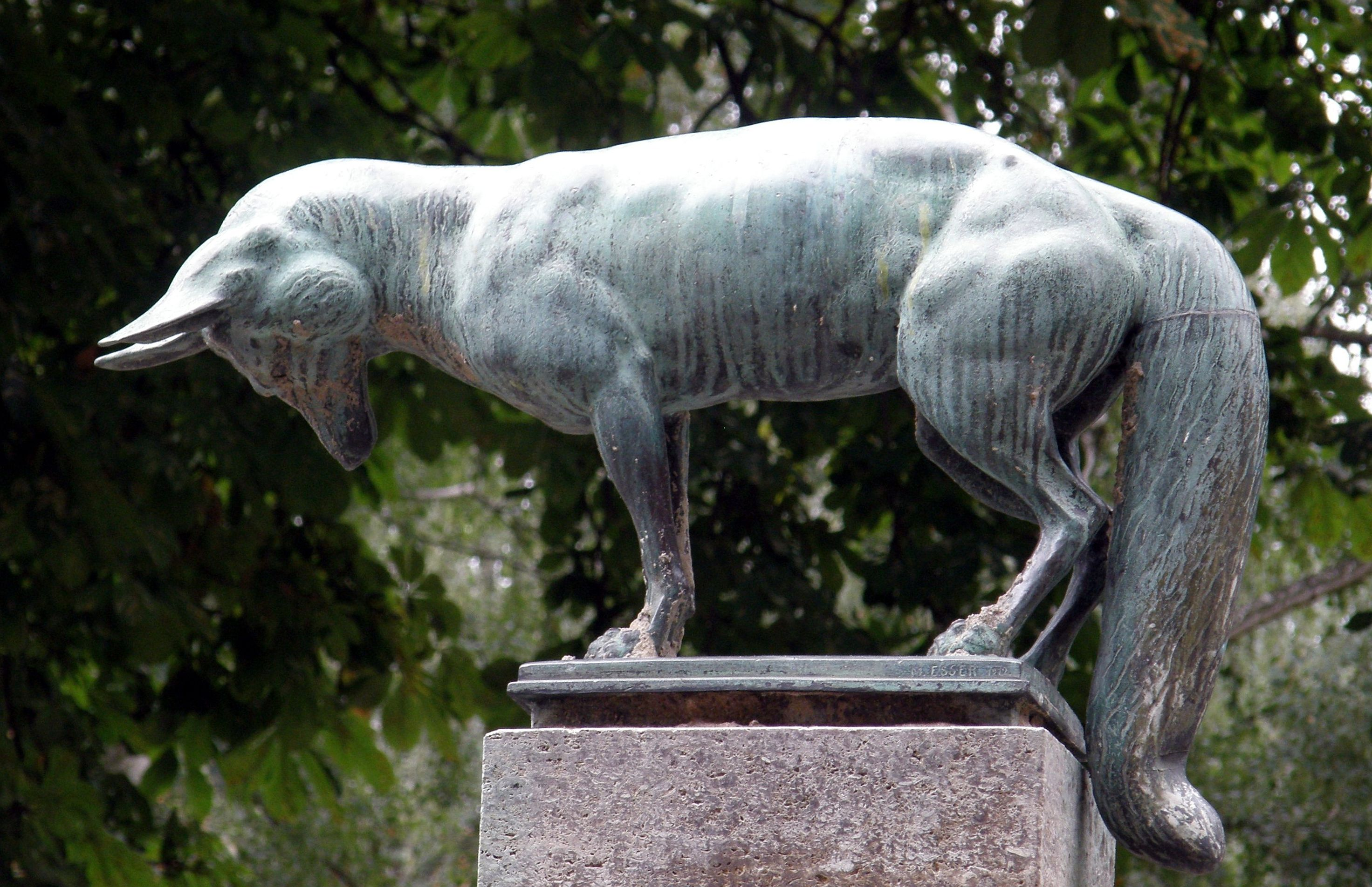 Max Esser: Fuchsbrunnen. 1912, Bronze. Ceciliengärten, Berlin-Schöneberg.